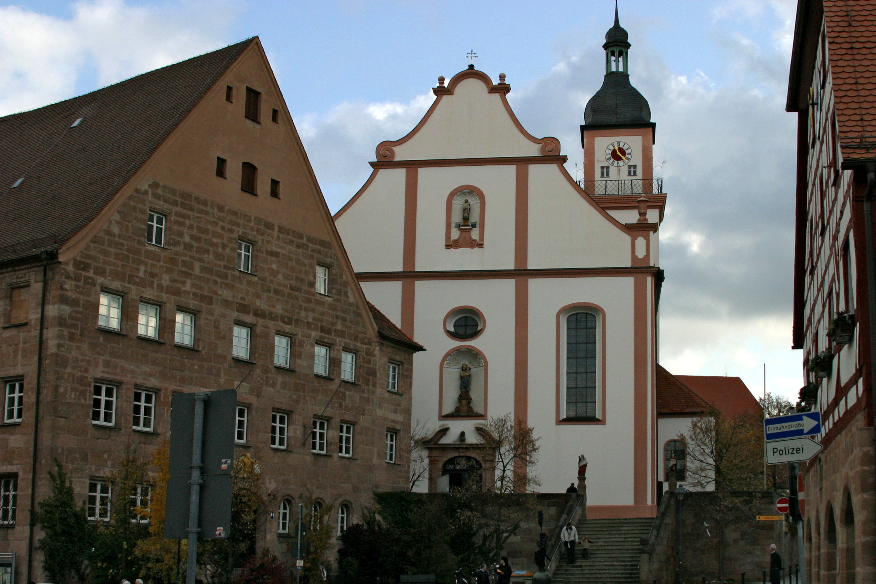 Picture from Hilpoltstein (Bayern), Stadtpfarrkirche